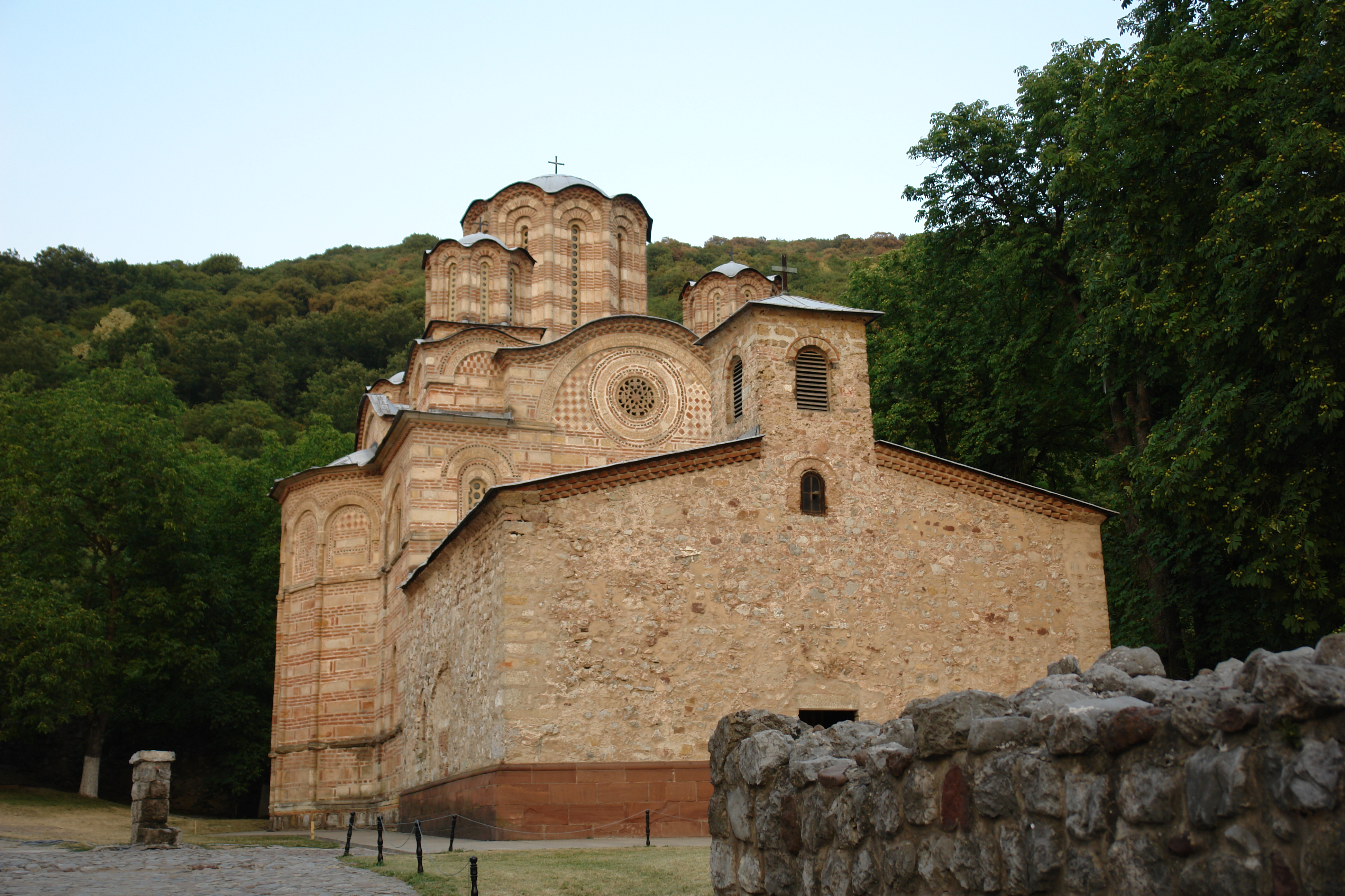 Manastir Ravanica